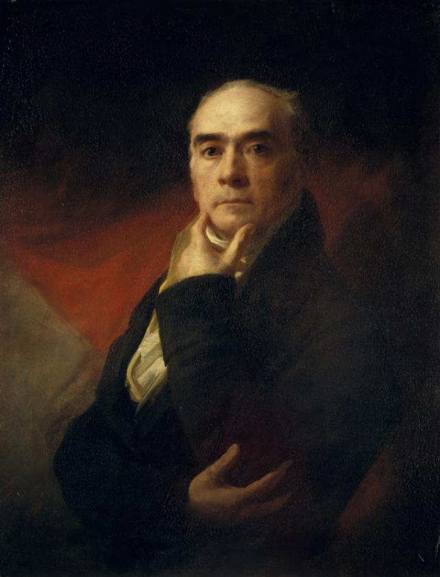 Self-portrait